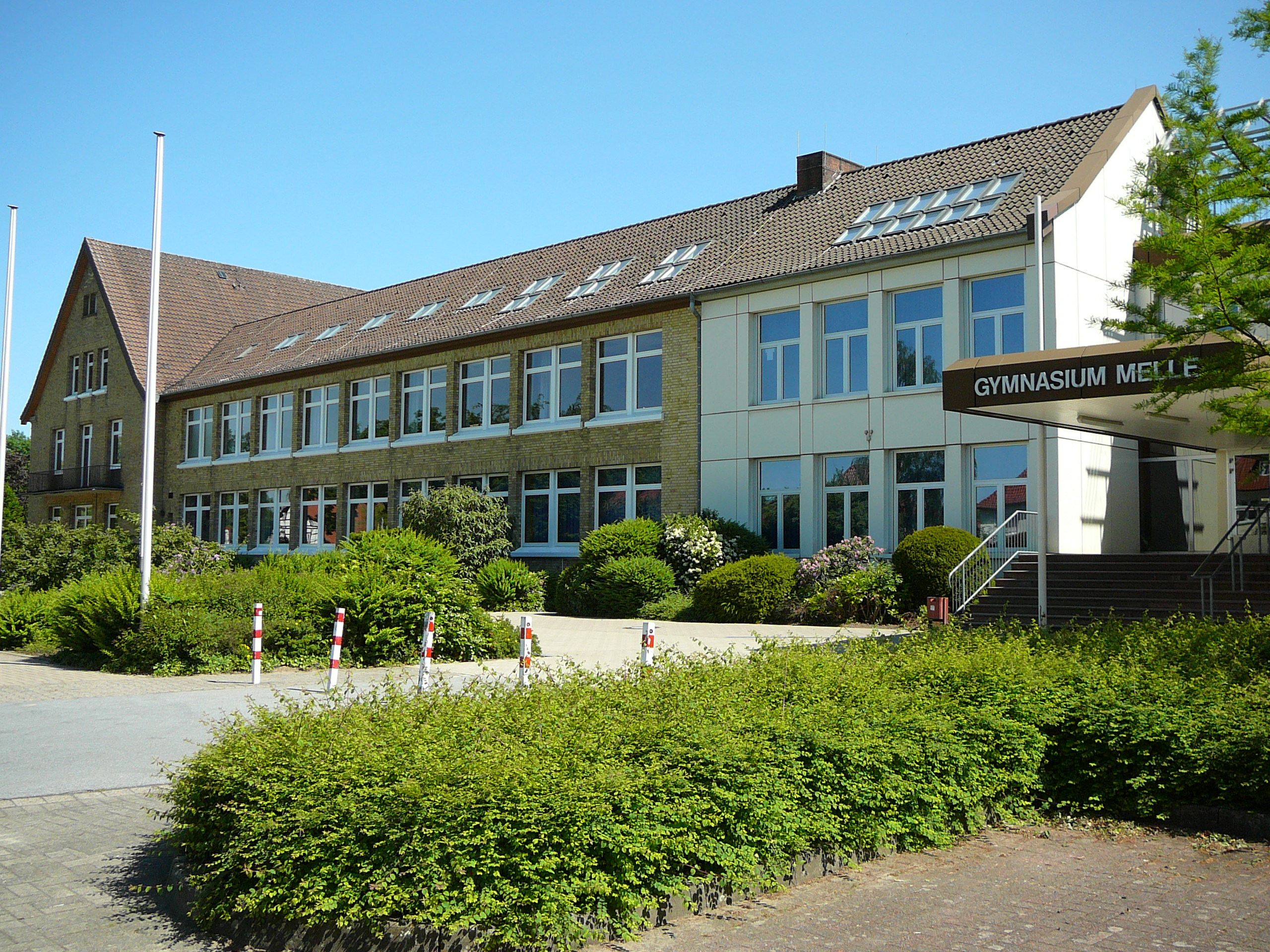 Gymnasium Melle, Westeingang